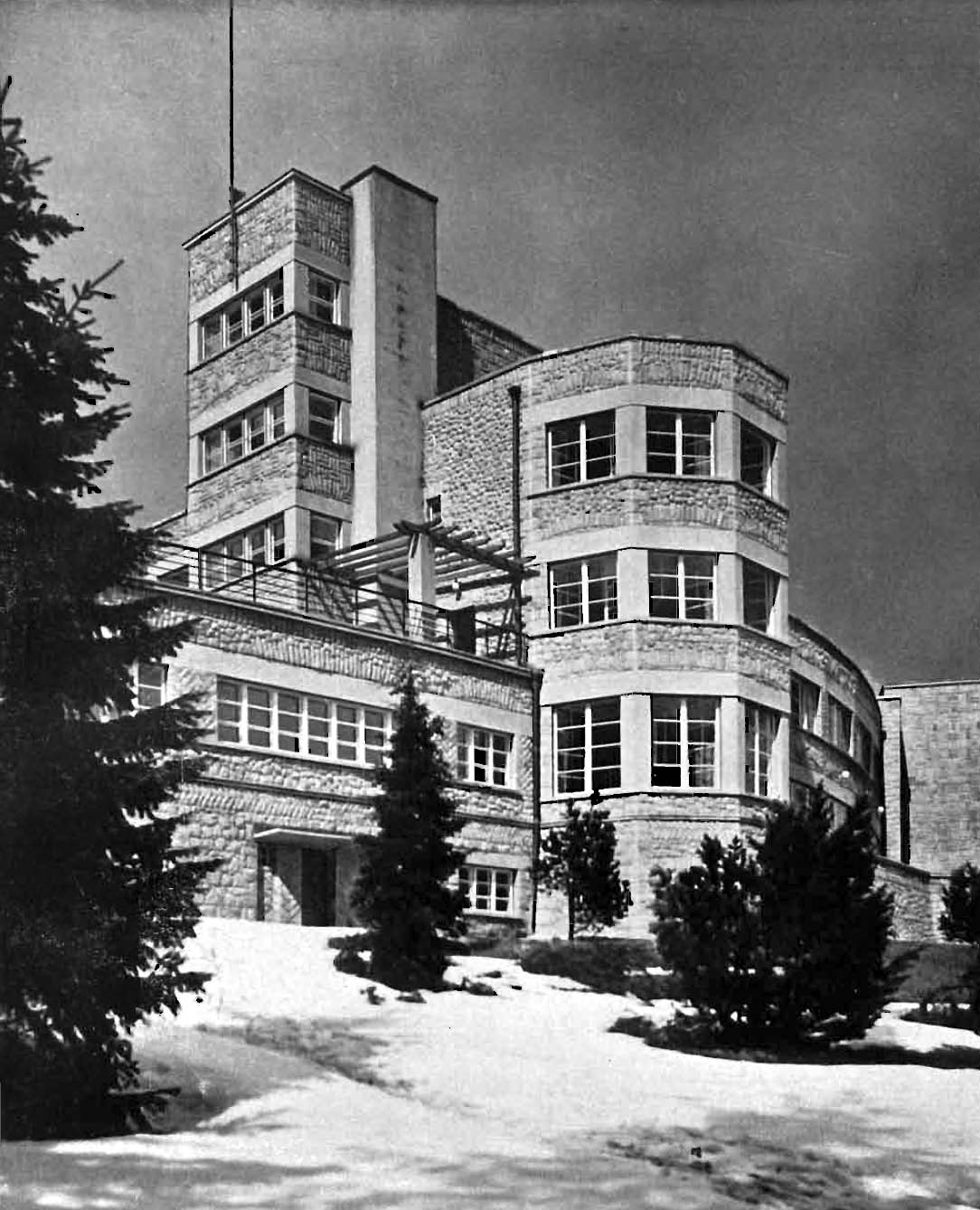 Палацик президента Речі Посполитої у Віслі у первісному вигляді до перебудови (Польща).